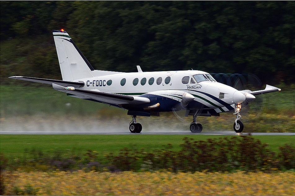 Pascan KingAir B100 à l'atterrissage